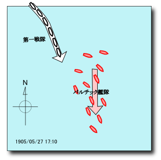 日本海海戦 位置10 日本語